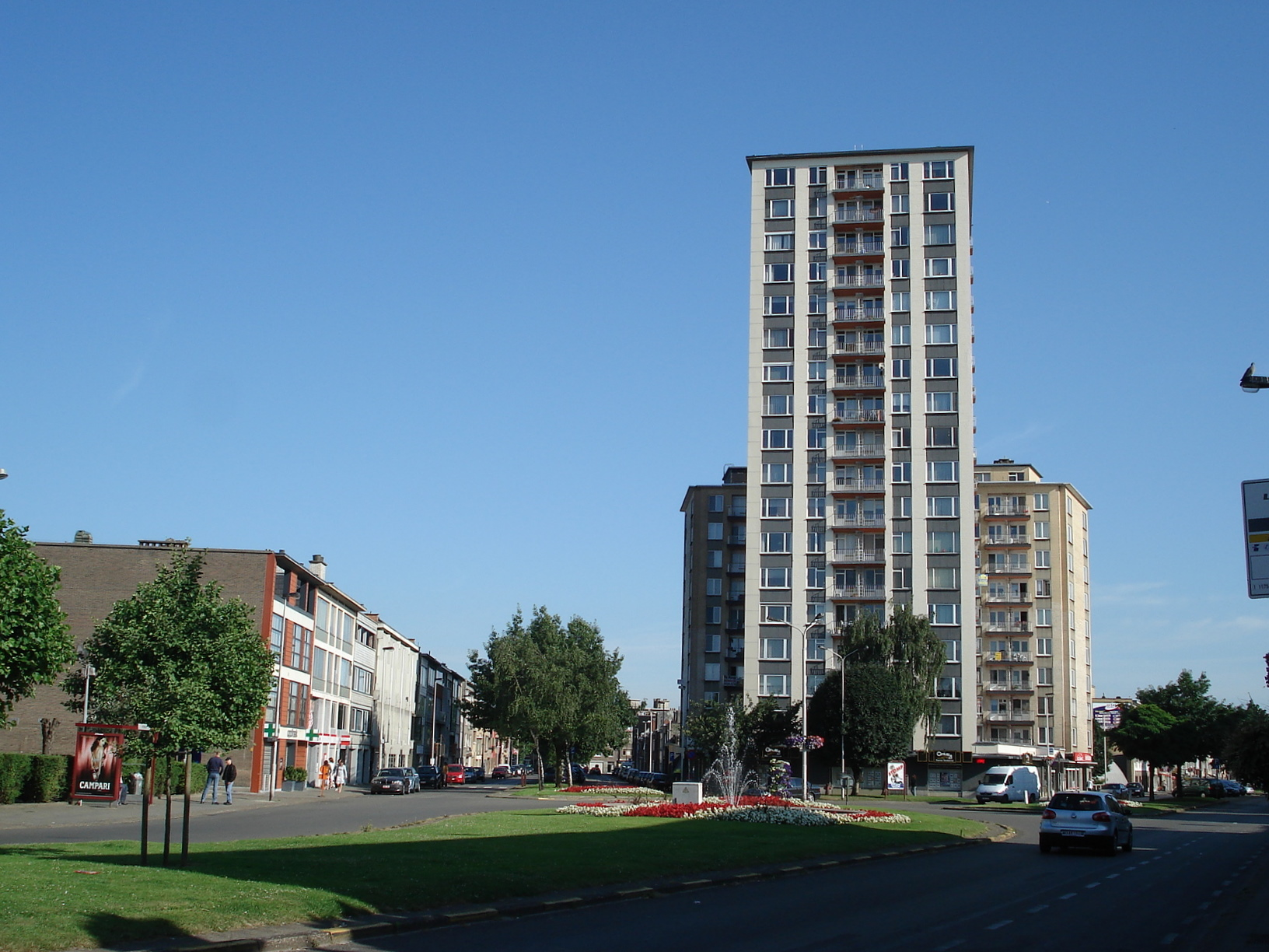 Deurne-Antwerpen ('Conforta-wijk', Deurne-Noord). Hoek Craeybeckxlaan (voorgrond en rechts v. hoogbouw) / Te Couwelaarlei (links v. hoogbouw) .